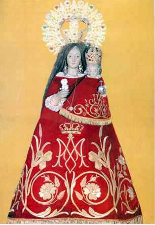 Imatge de la Mare de Déu del Remei d'Alcanar (Montsià) - Catalunya